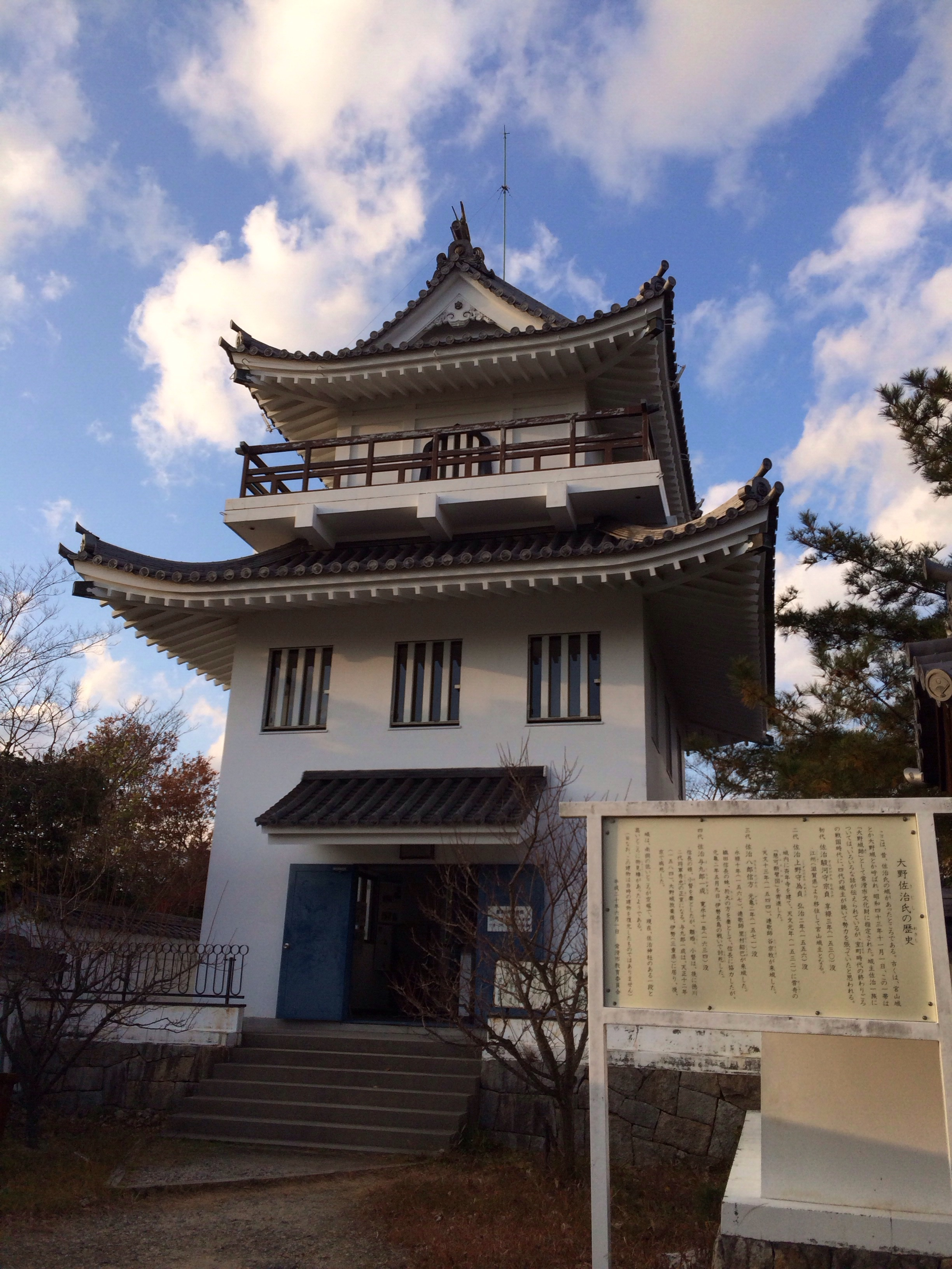 大野城(模擬天守） 佐治氏がお江を迎えた地